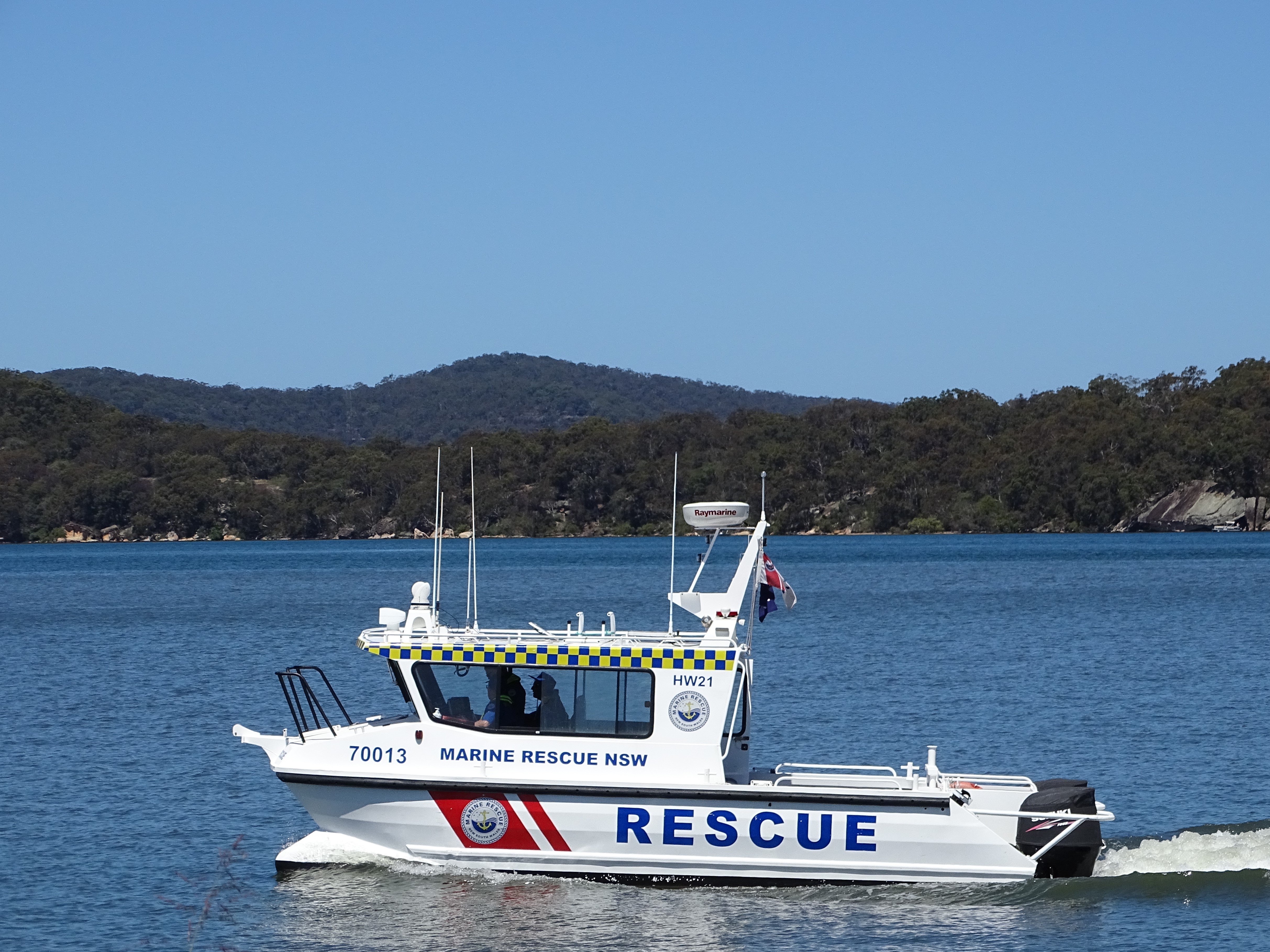 Marine Rescue NSW